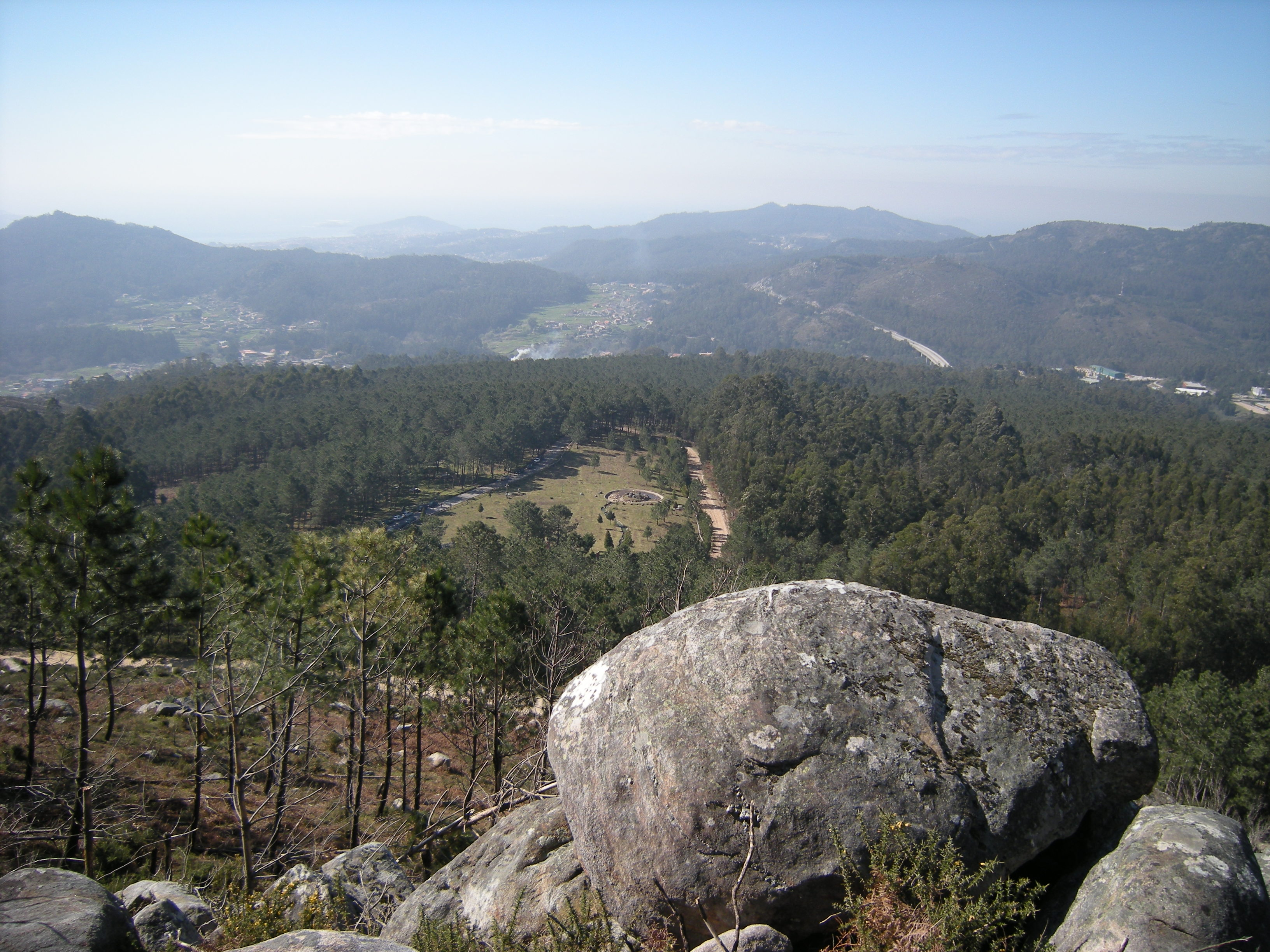 Monte Galiñeiro, Gondomar, Galicia.